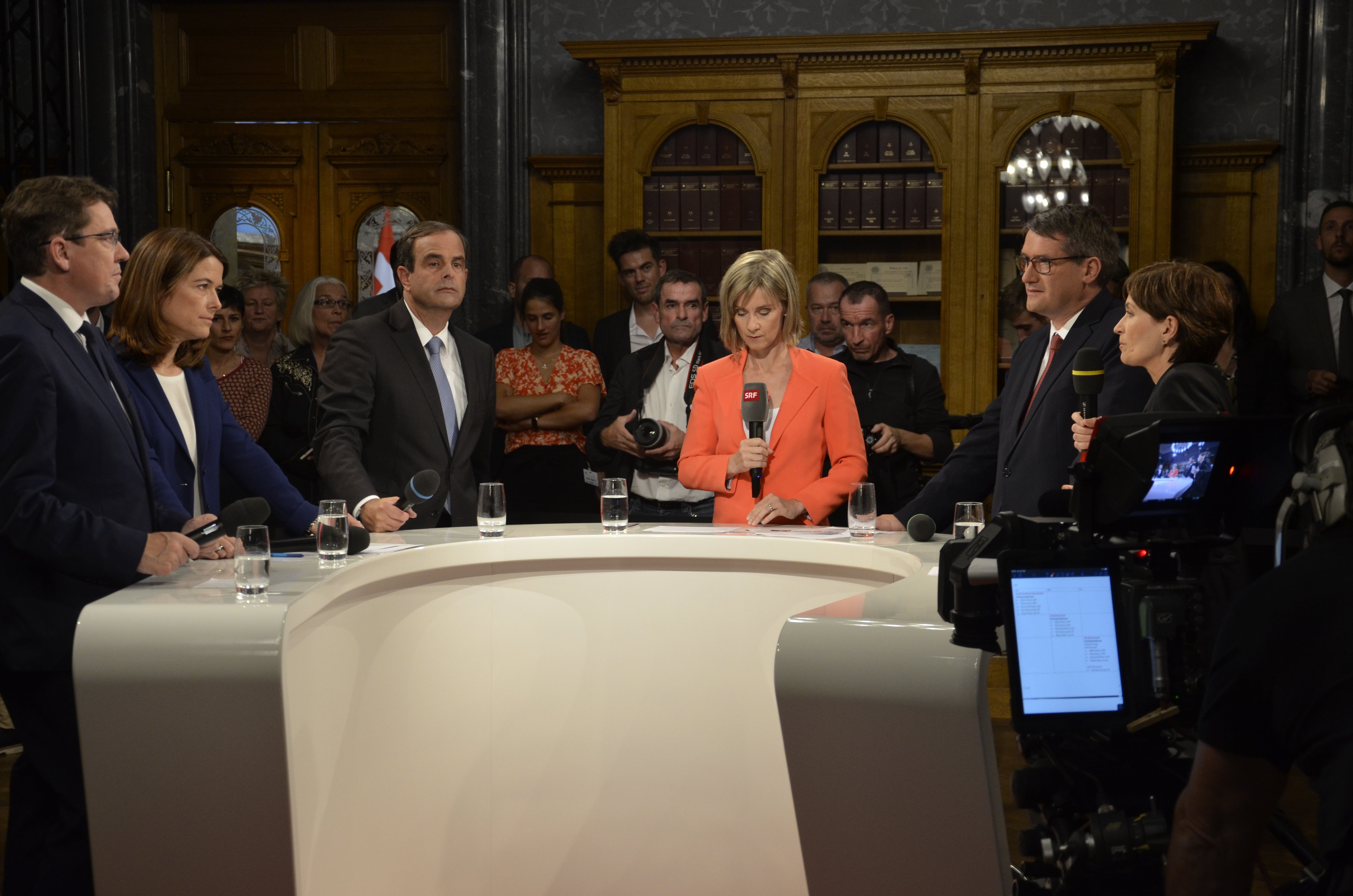 Schweizer Parlamentswahlen 2019: TV-Gespräch mit den Präsidentinnen und Präsidenten der 5 grössten Parteien im Bundeshaus.